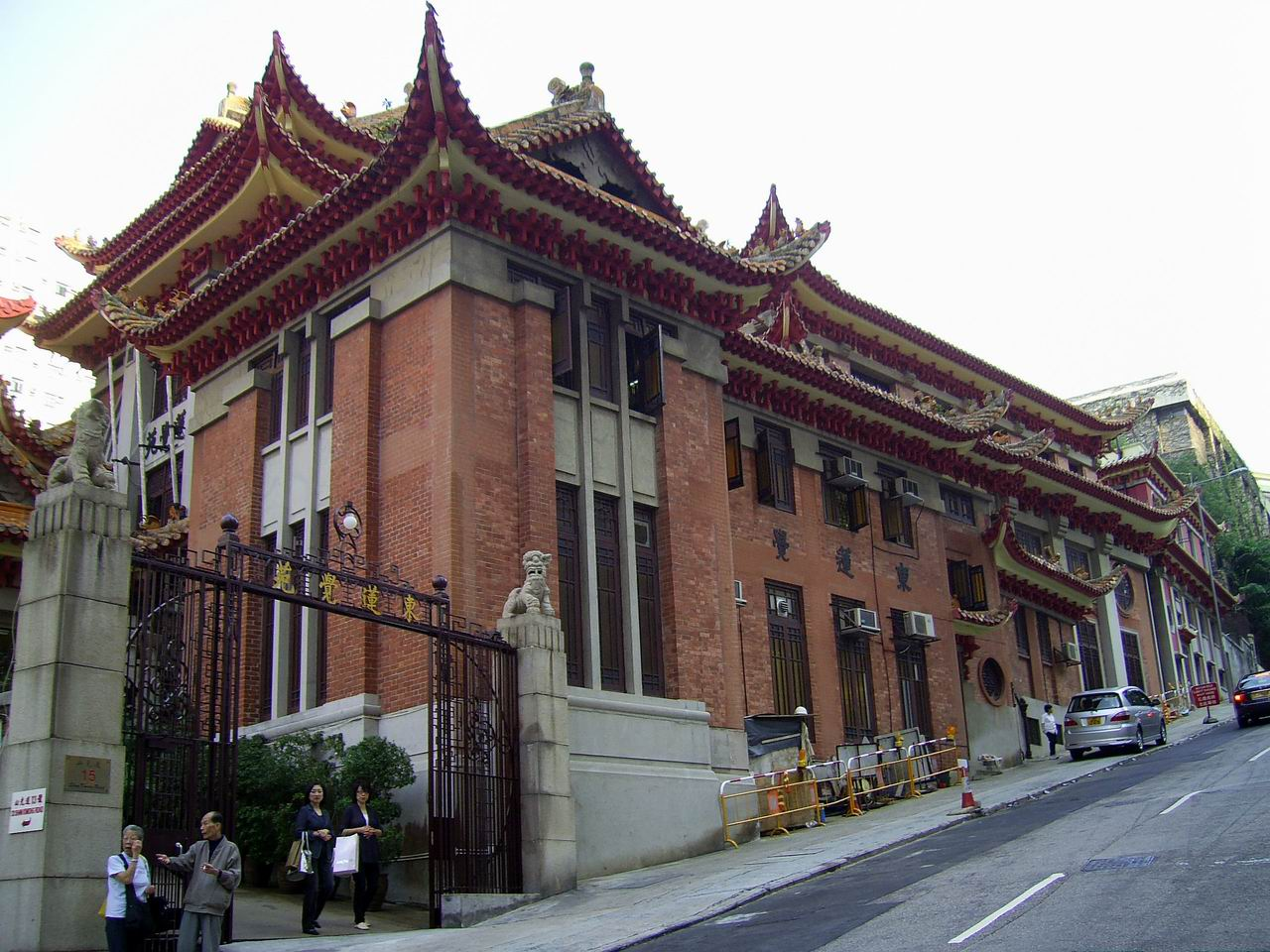 中文（香港）: 東蓮覺苑